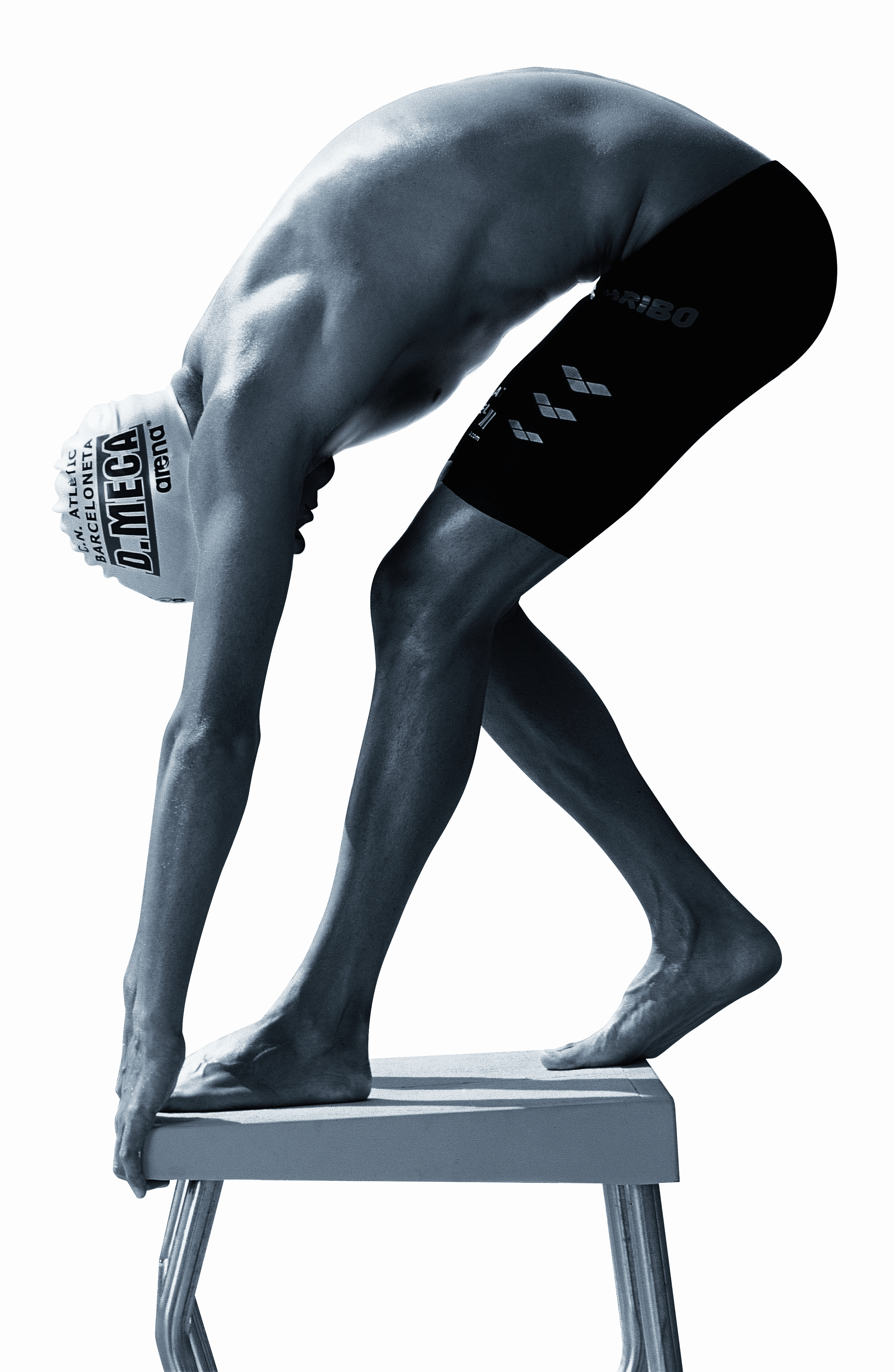 David Meca, Swimming World Champion